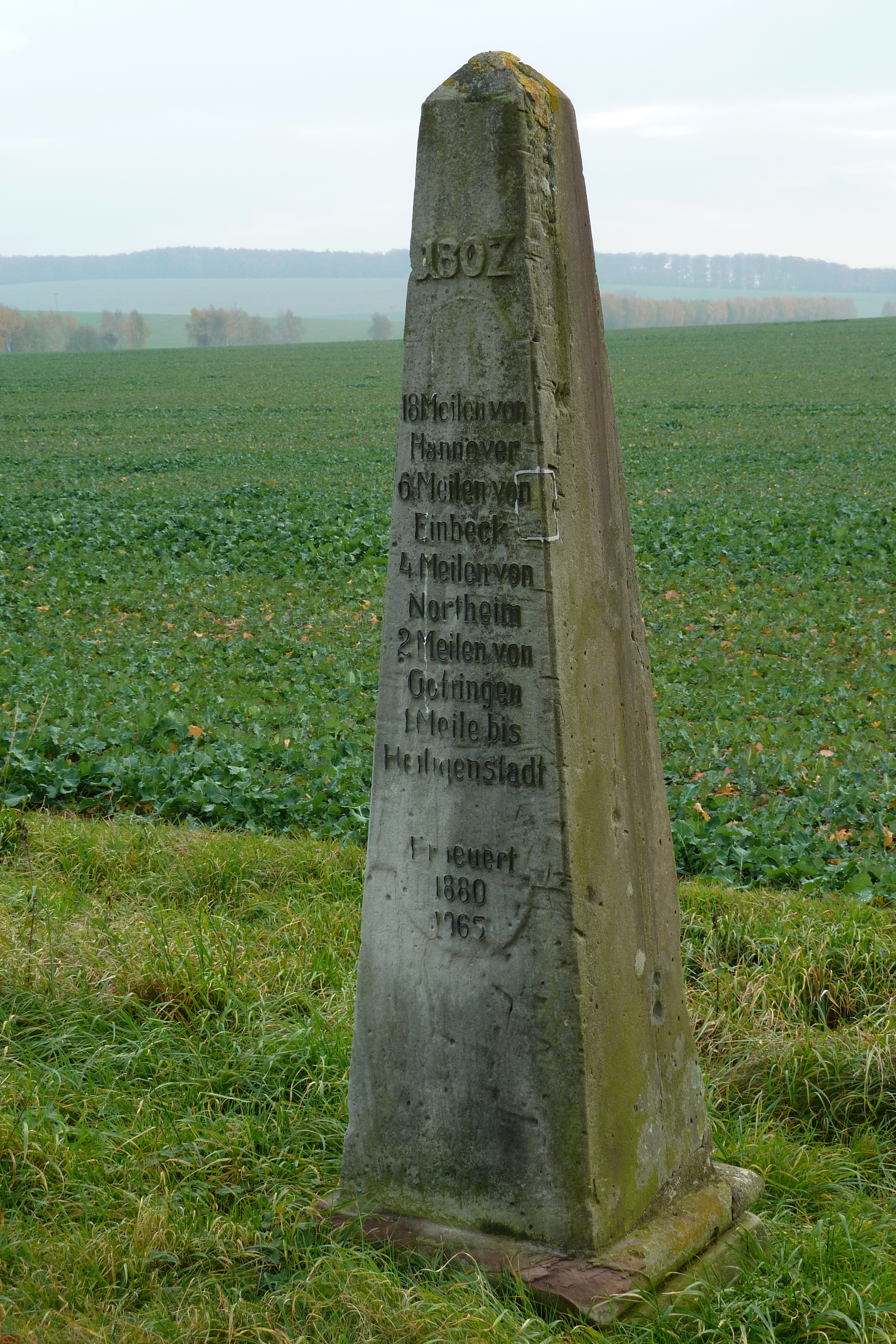 Meilensäule an der niedersächsischen Landstraße 568 bei Vogelsang, Bremke, Gemeinde Gleichen, Südniedersachsen, unmittelbar neben der Grenze zu Thüringen. Errichtet 1802. Aufschrift: 1802 18 Meilen von Hannover6 Meilen von Einbeck4 Meilen von Northeim2 Meilen von Göttingen1 Meile bis Heiligenstadt Erneuert18801965